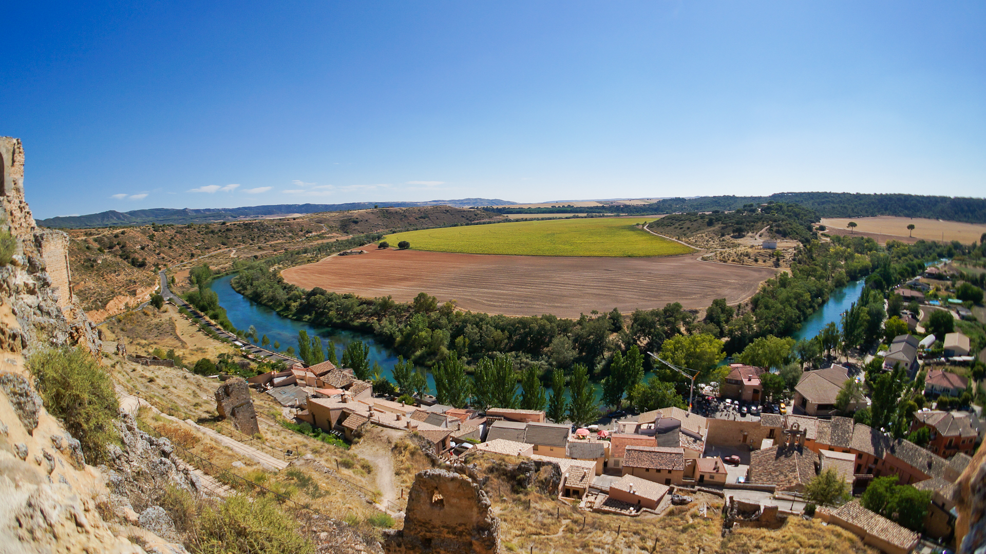 Zorita de los Canes, provincia de Guadalajara, España.